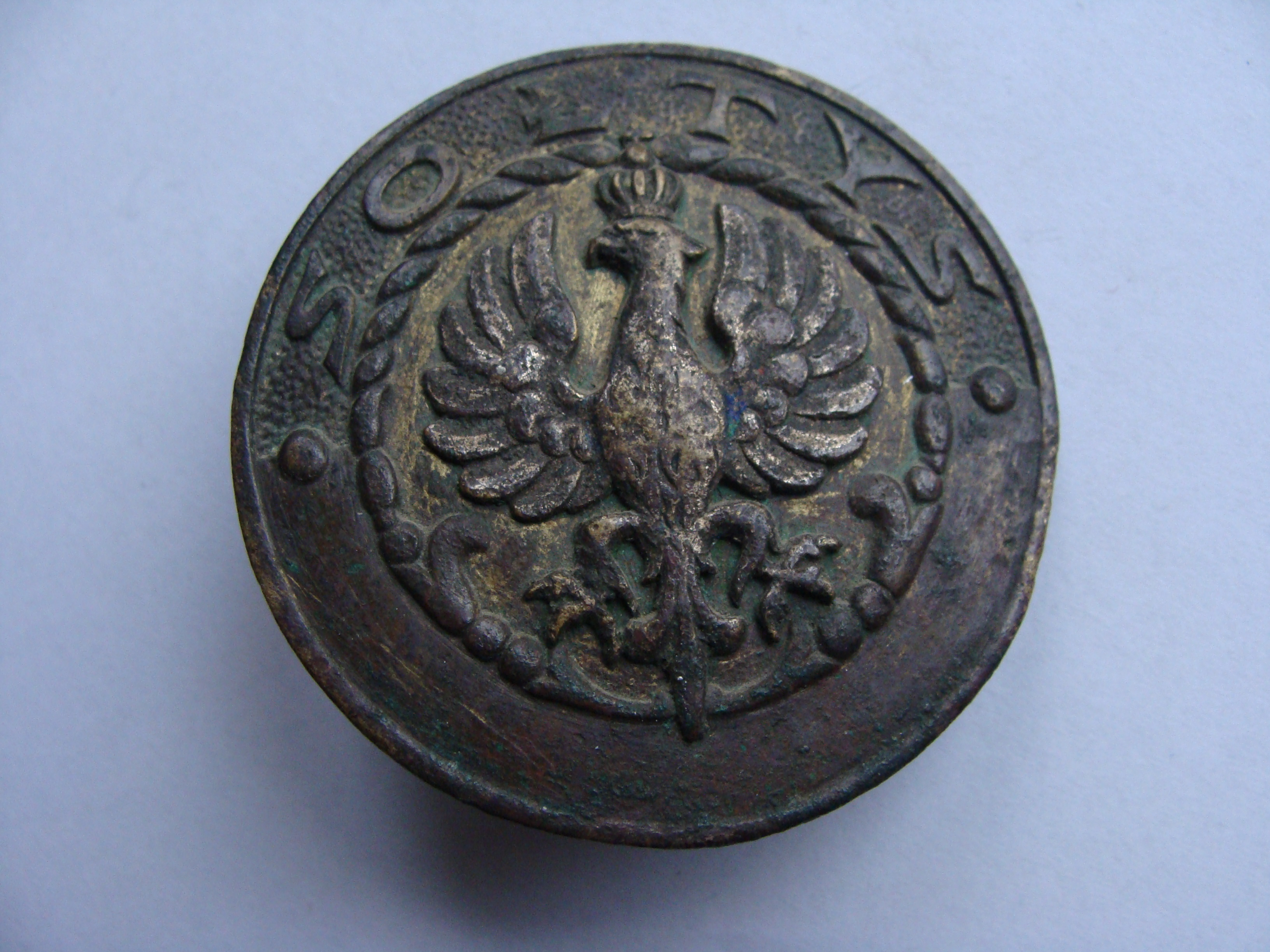 Odznaka sołtys okres międzywojenny